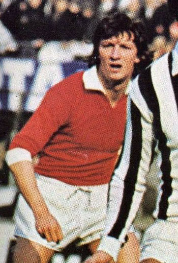 Torino, stadio Comunale, 16 febbraio 1975. L'attaccante biancorosso Giannantonio Sperotto in azione nel corso della sfida tra Juventus e Varese (3-0) valevole per la 18ª giornata del campionato italiano di Serie A 1974-75.